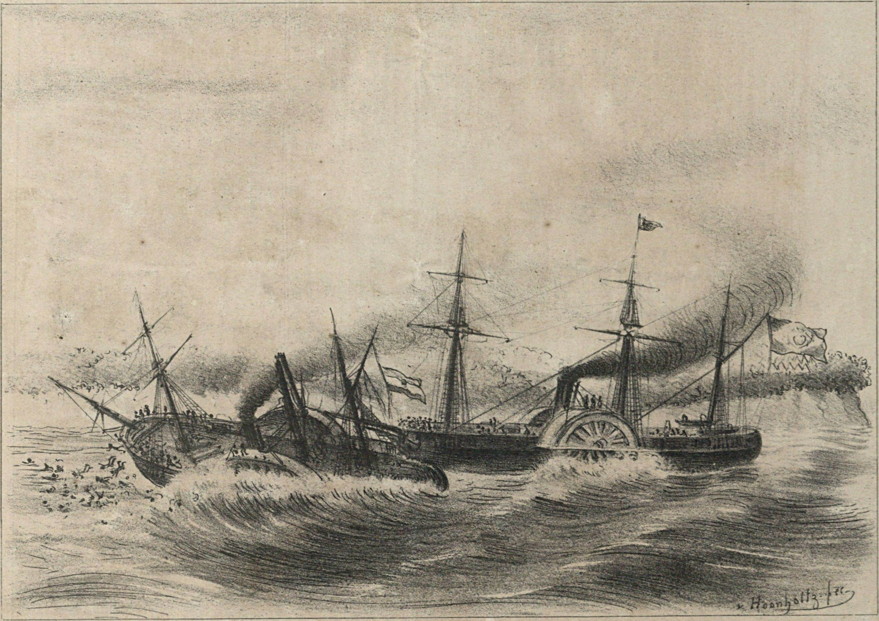 Episódio do dia 11 de Junho de 1865. Combate Naval de Riachuelo. A Fragata Amazonas com o pavilhão do Chefe Barroso e comandada pelo Capitão de Fragata, Brito, mettendo a pique um vapor ...